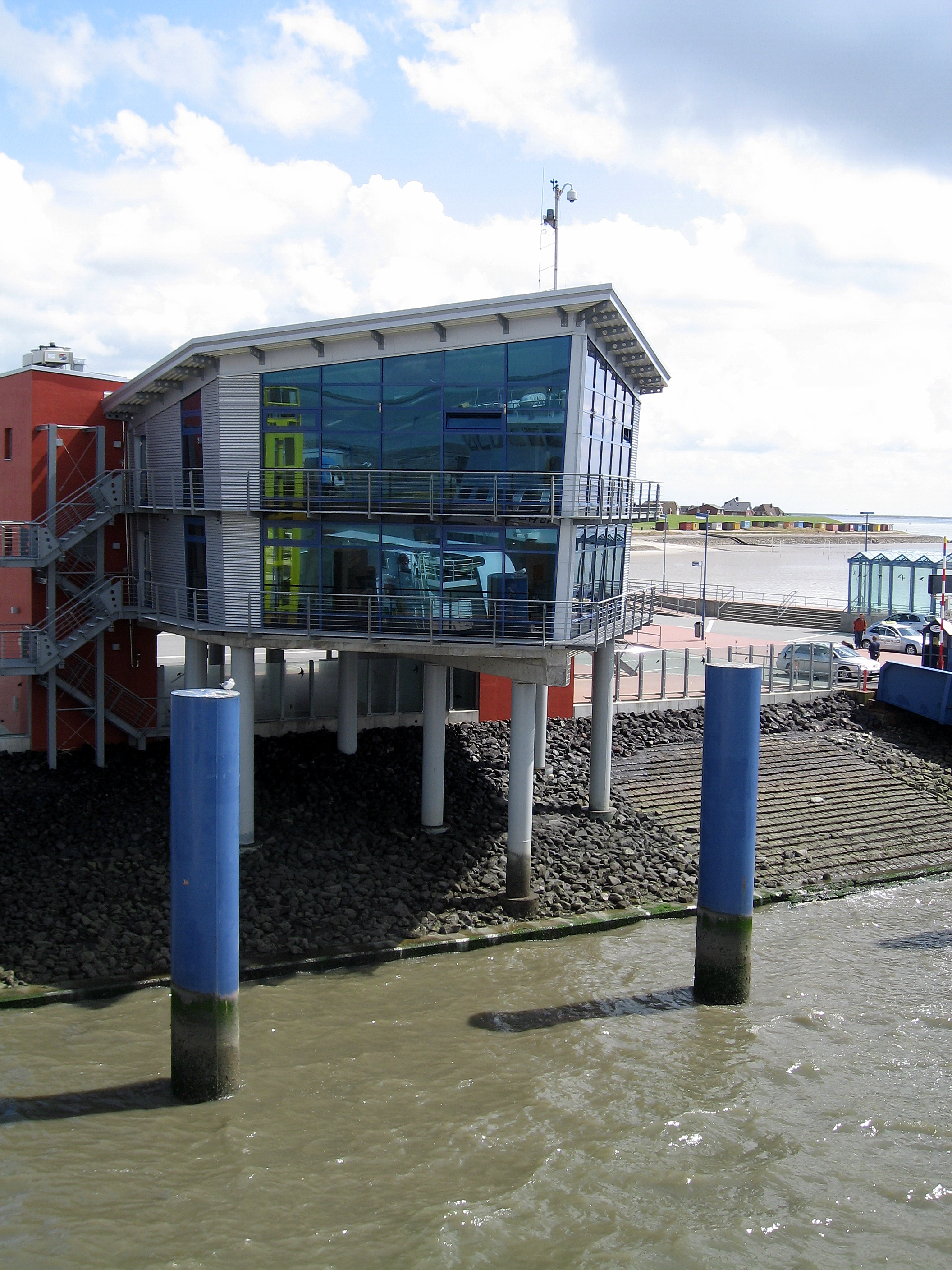 Dagebüll, Anleger der Fähren nach Amrum und Wyk